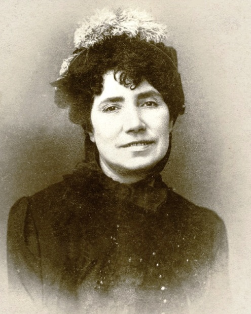 Imaxe de Rosalía de Castro